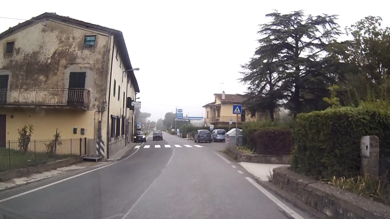 San Piero a Sieve, frazione Casa Loli